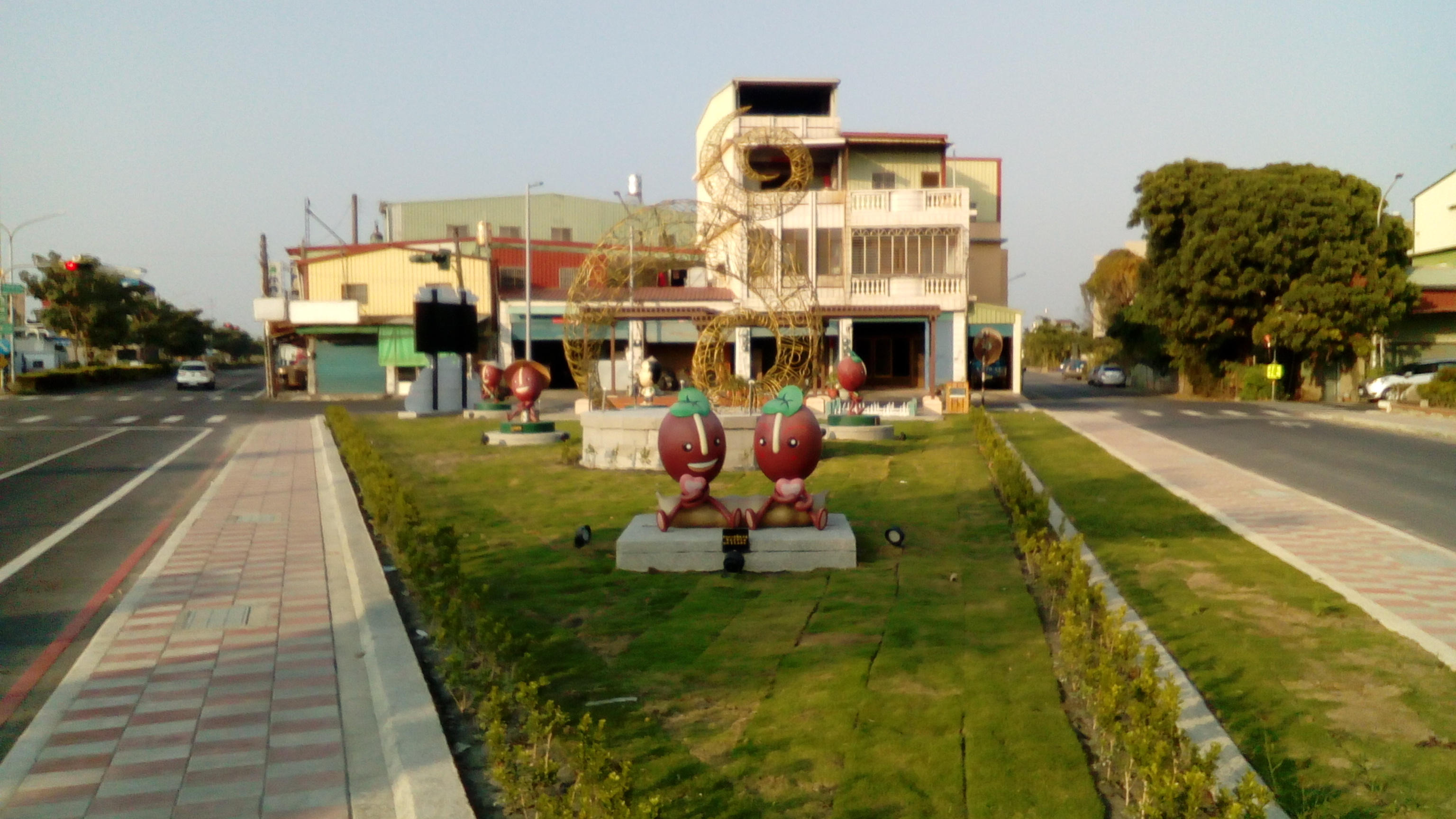 2019年11月落成